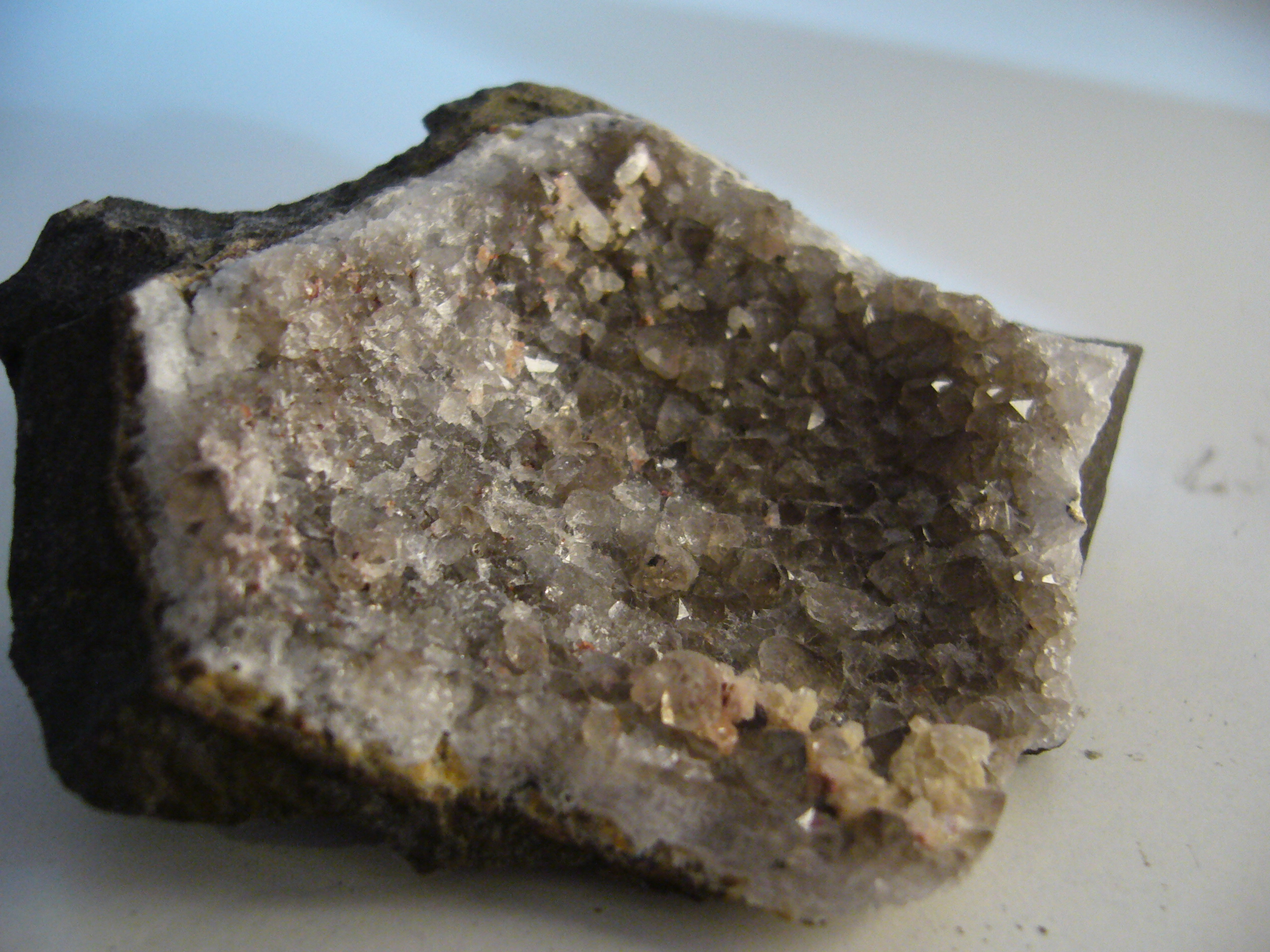 Harmotom